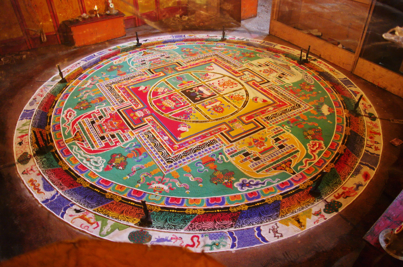 3D-Mandala im Kloster Pälkhor Chöde